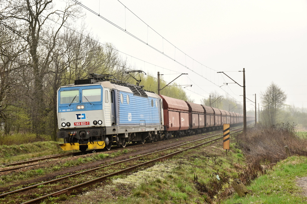 Dopravce CD Cargo Poland využívá k vozbě svých vlaků i lokomotivy řad 130 a 163 mateřské společnosti ČD Cargo.